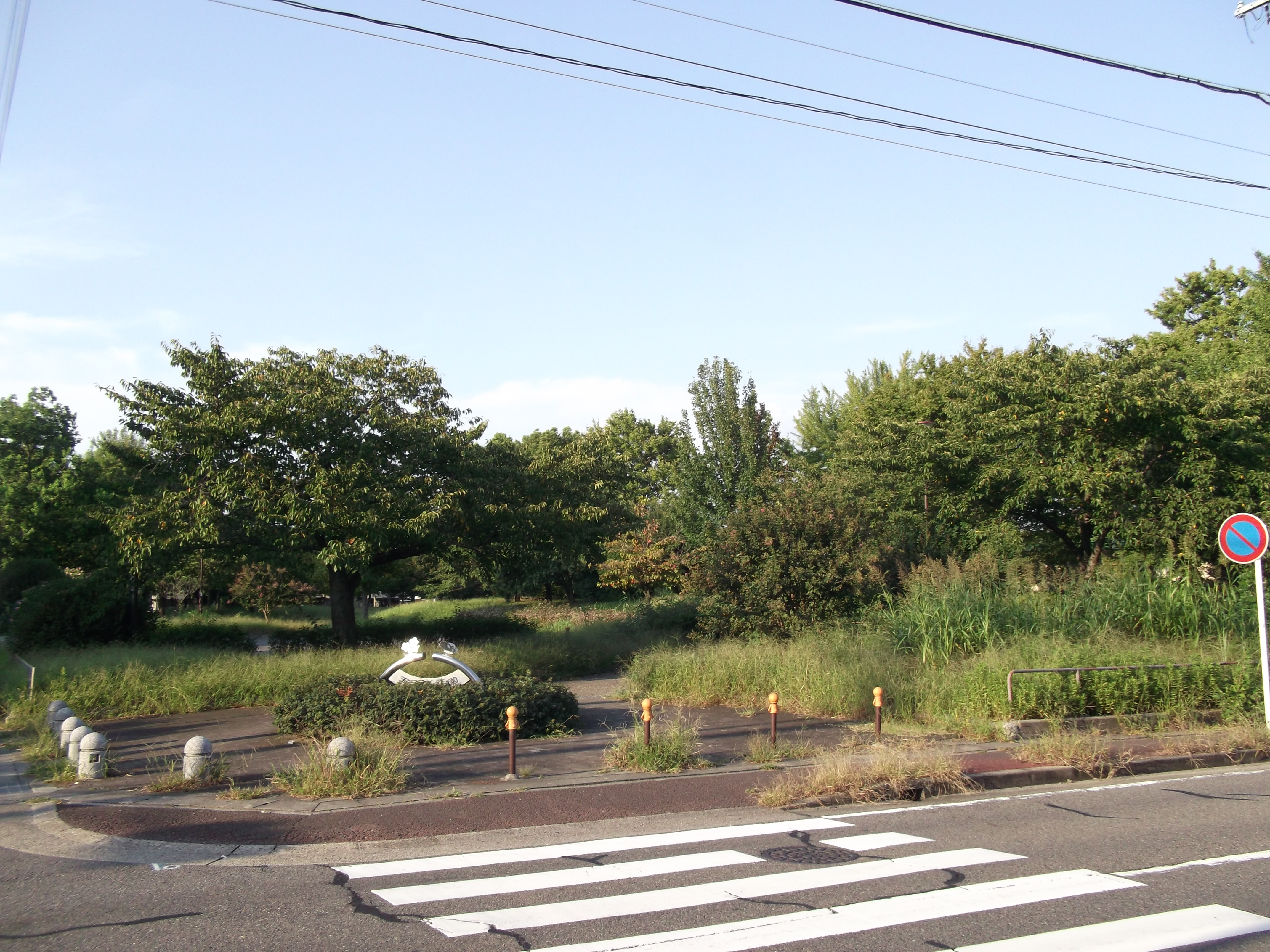 名古屋市西区の五町公園を南側公道西側より撮影